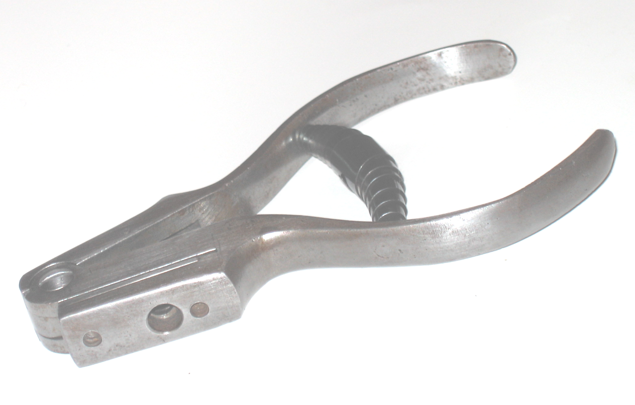 Poinçon utilisés par les TCL (Transports en Commun Lyonnais) source : objet perso / photo : Dominique grassigli